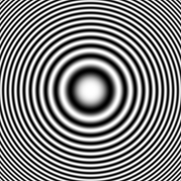 Testbild "Zoneplate"